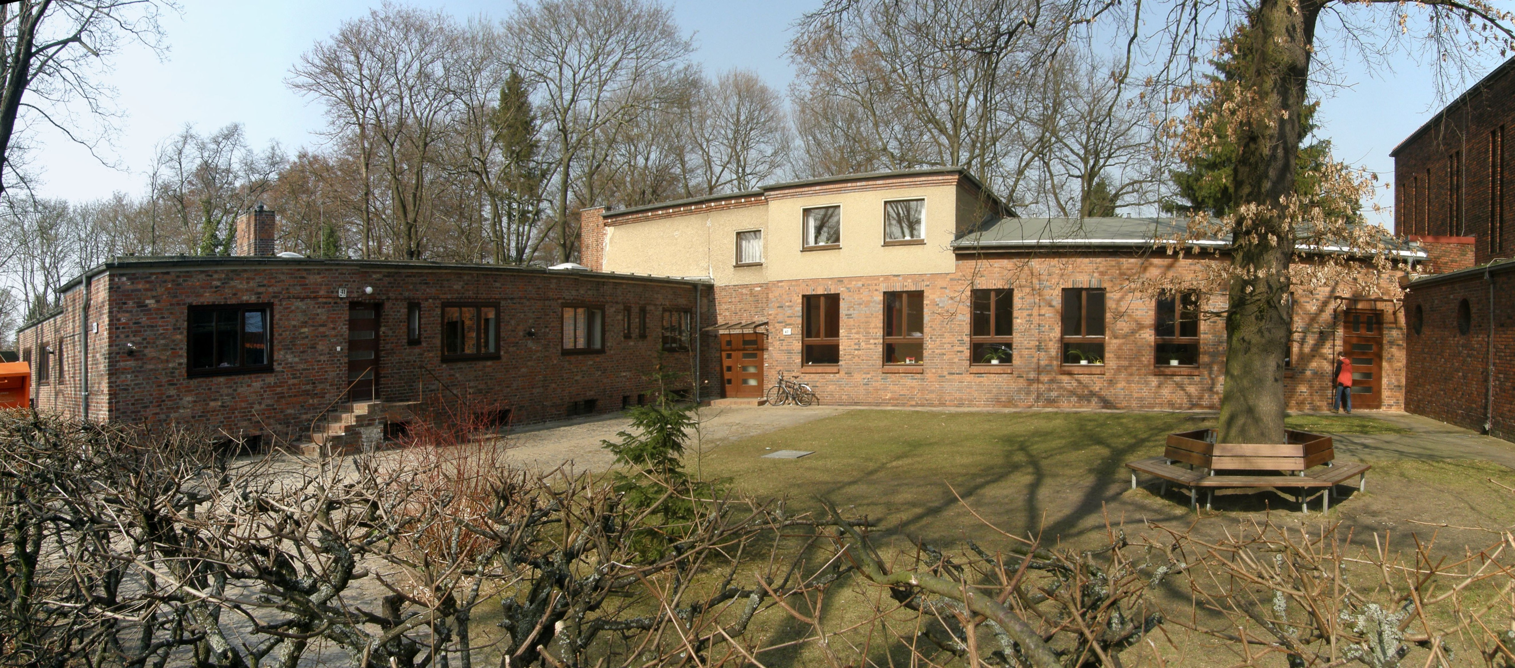 Berlin-Kaulsdorf, St.-Martinskirche: nebenstehender Kindergarten